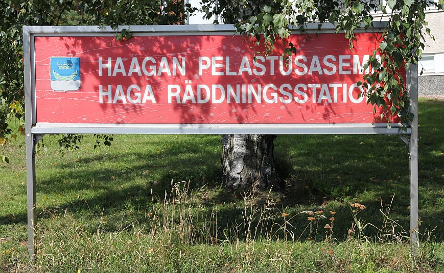 Haagan pelastusaseman kyltti Helsingin Etelä-Haagassa.